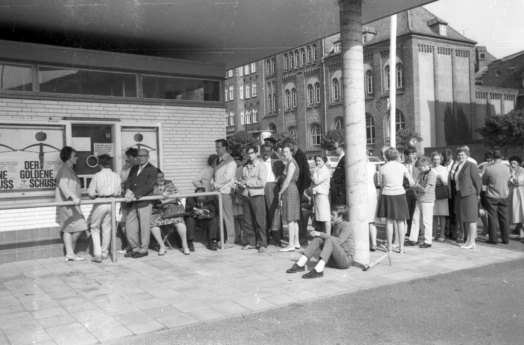 Kartenverkauf für die Aufzeichnung der Fernsehsendung "Der goldene Schuß" in der Ostseehalle